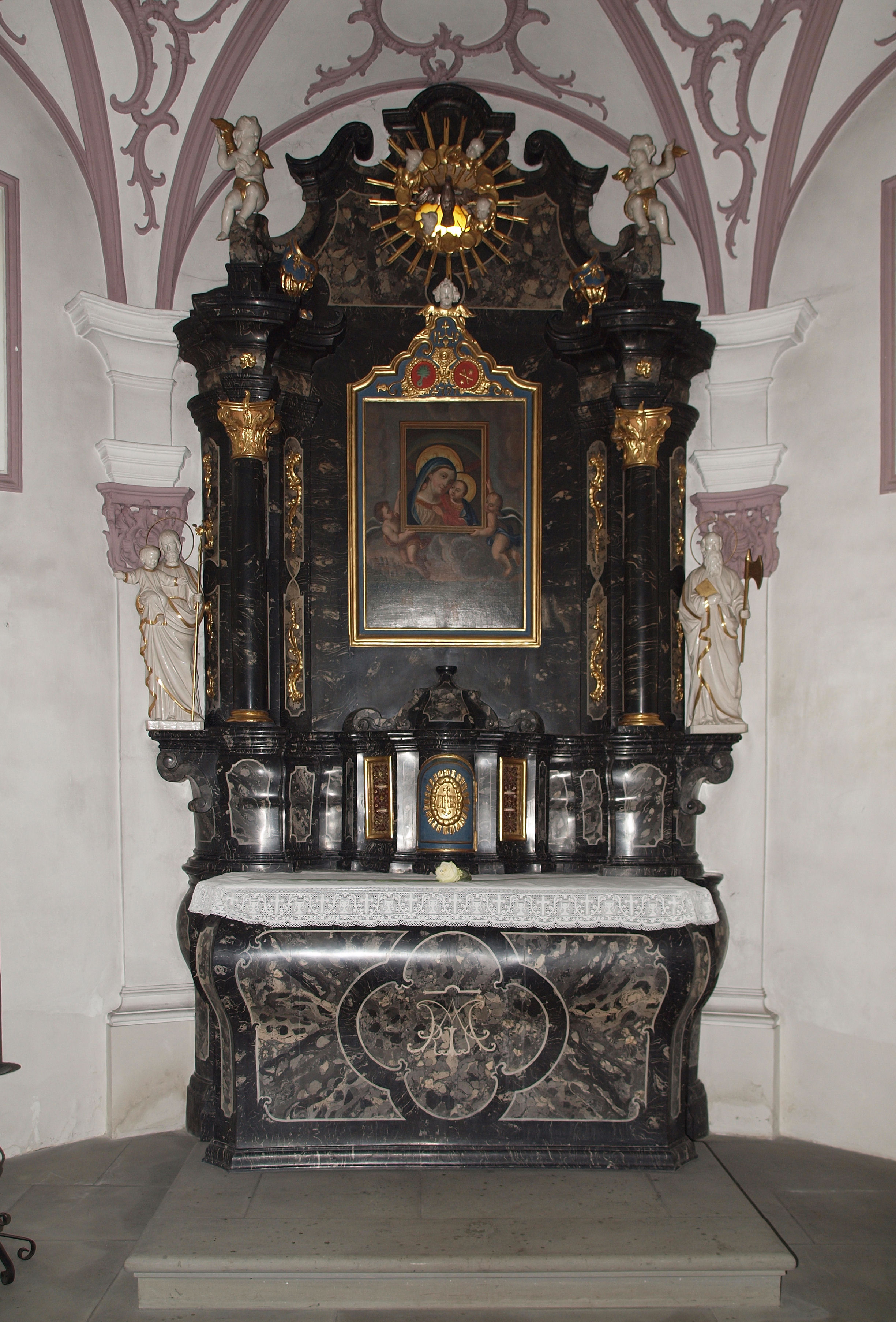 Der hauptaltar der Weinrebenkapelle in Hünenberg ZG.